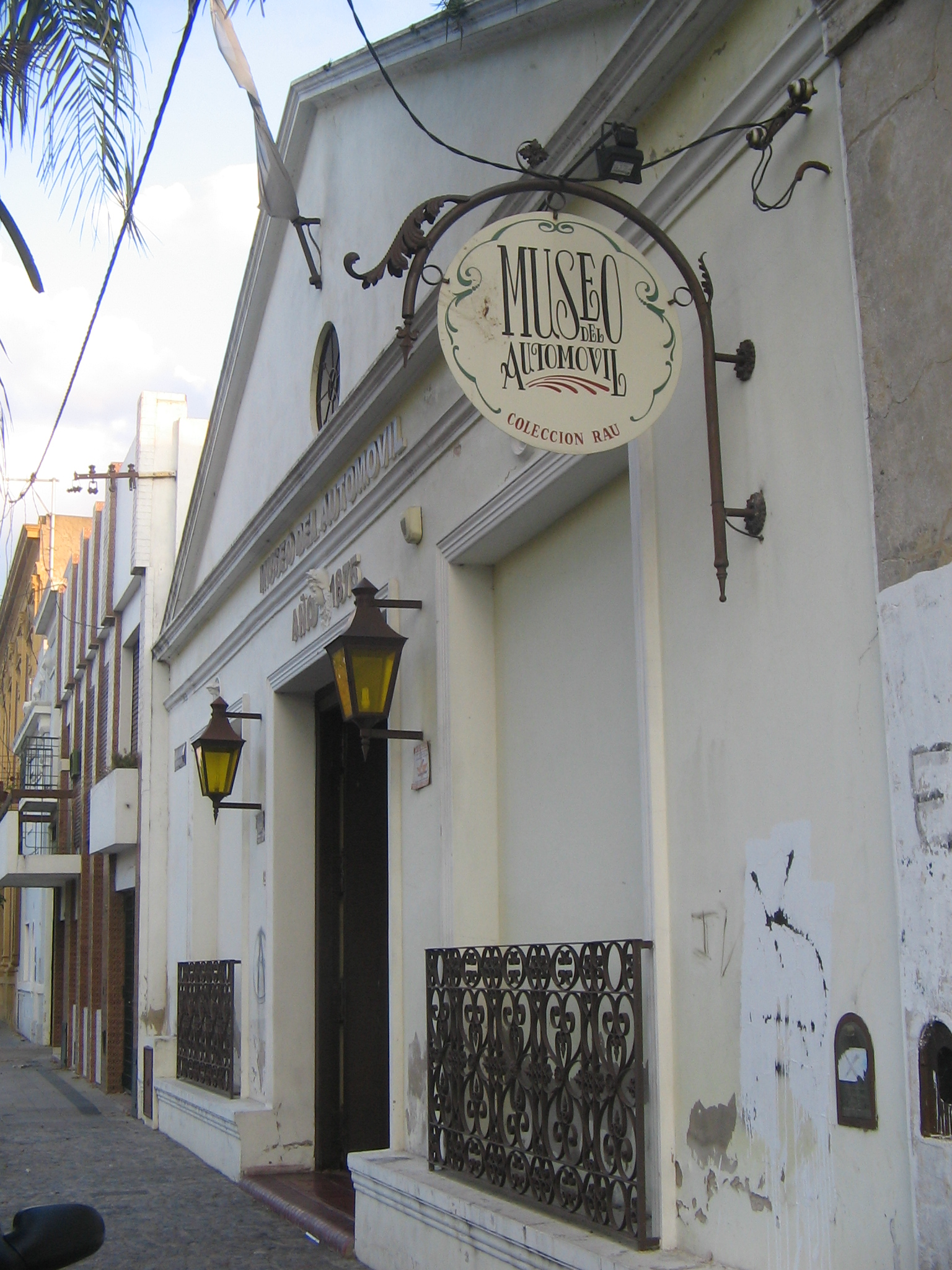 Fachada del Museo del Automóvil Rau, en la ciudad de La Plata